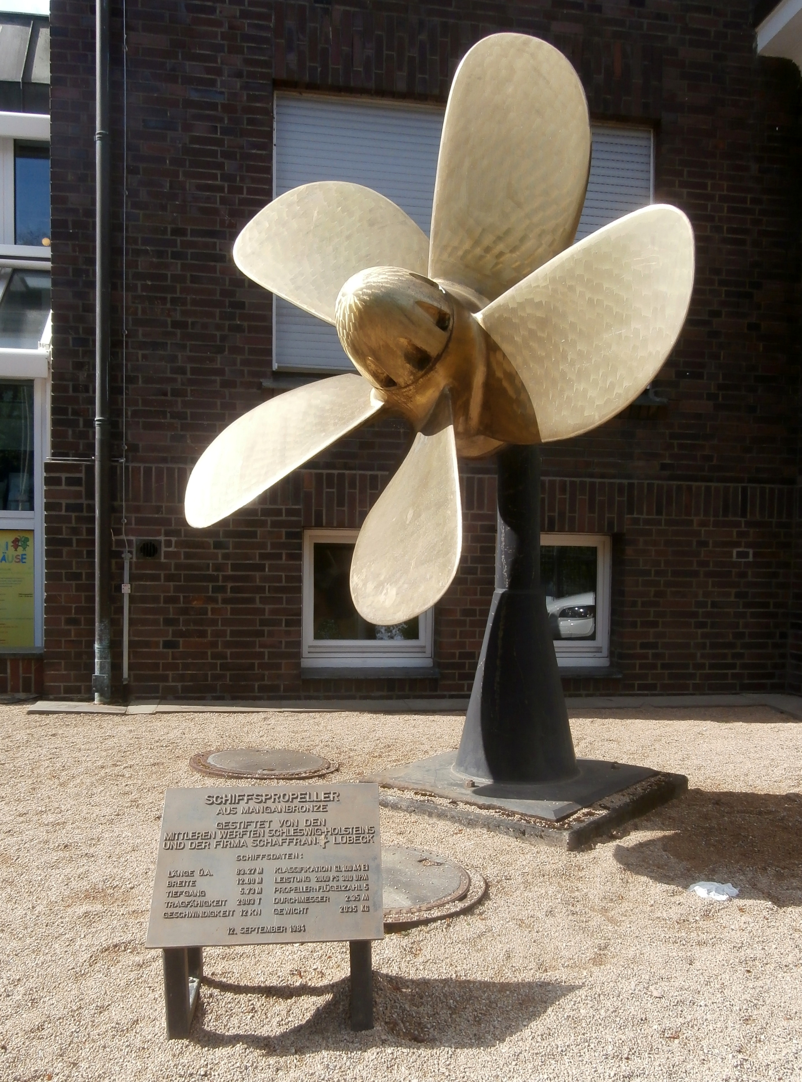 Ehemalige Landesvertretung Schleswig-Holstein, Kurt-Schumacher-Straße 24–26, Bonn-Gronau: Schiffspropeller